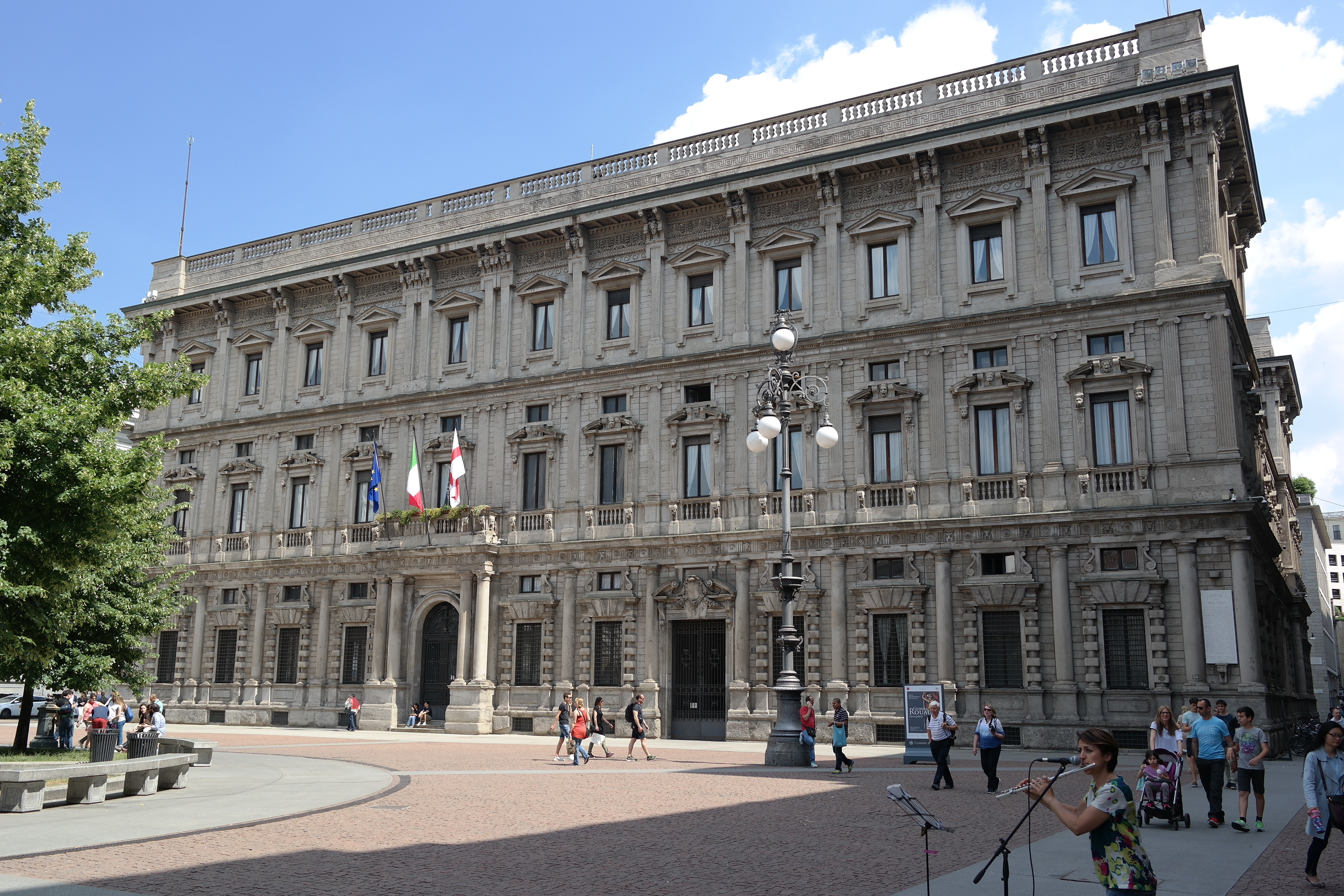 Palazzo Marino a Milano